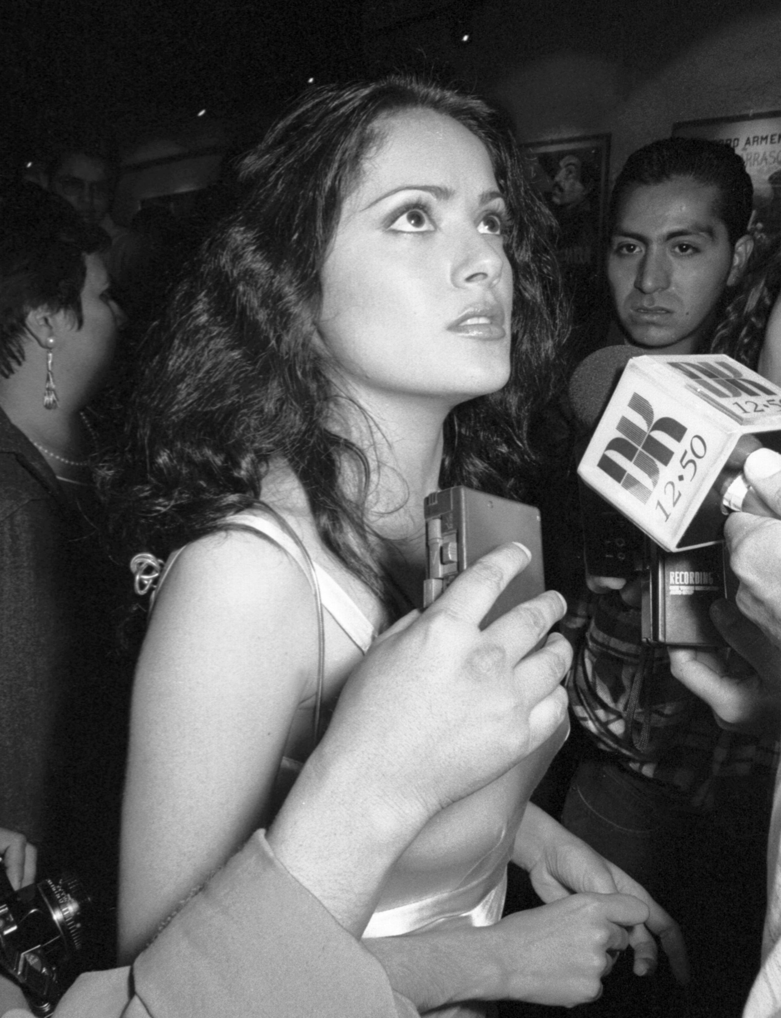 Salma Hayek 02